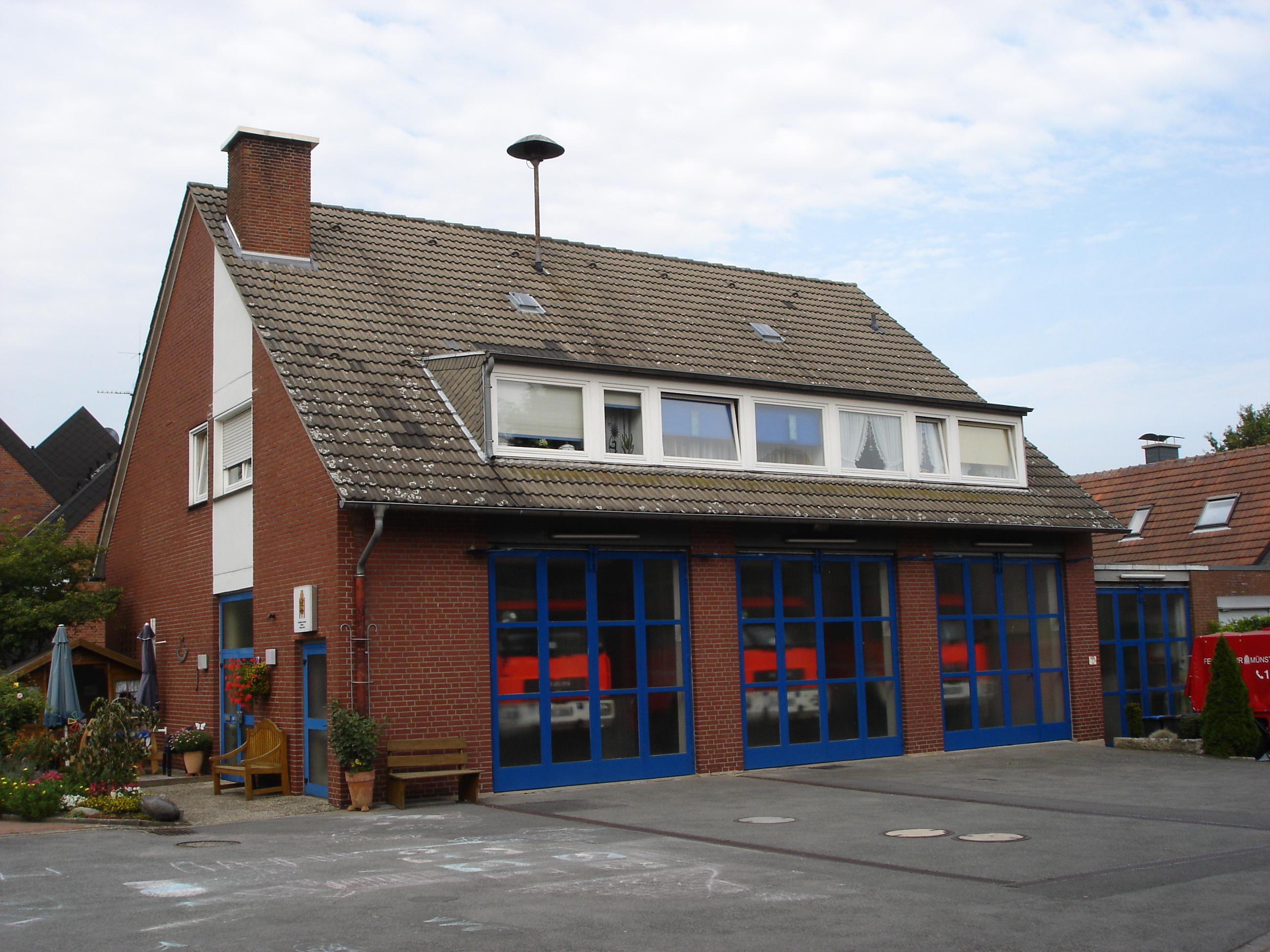 Gerätehaus der Feuerwehr in Roxel, Münster, Deutschland